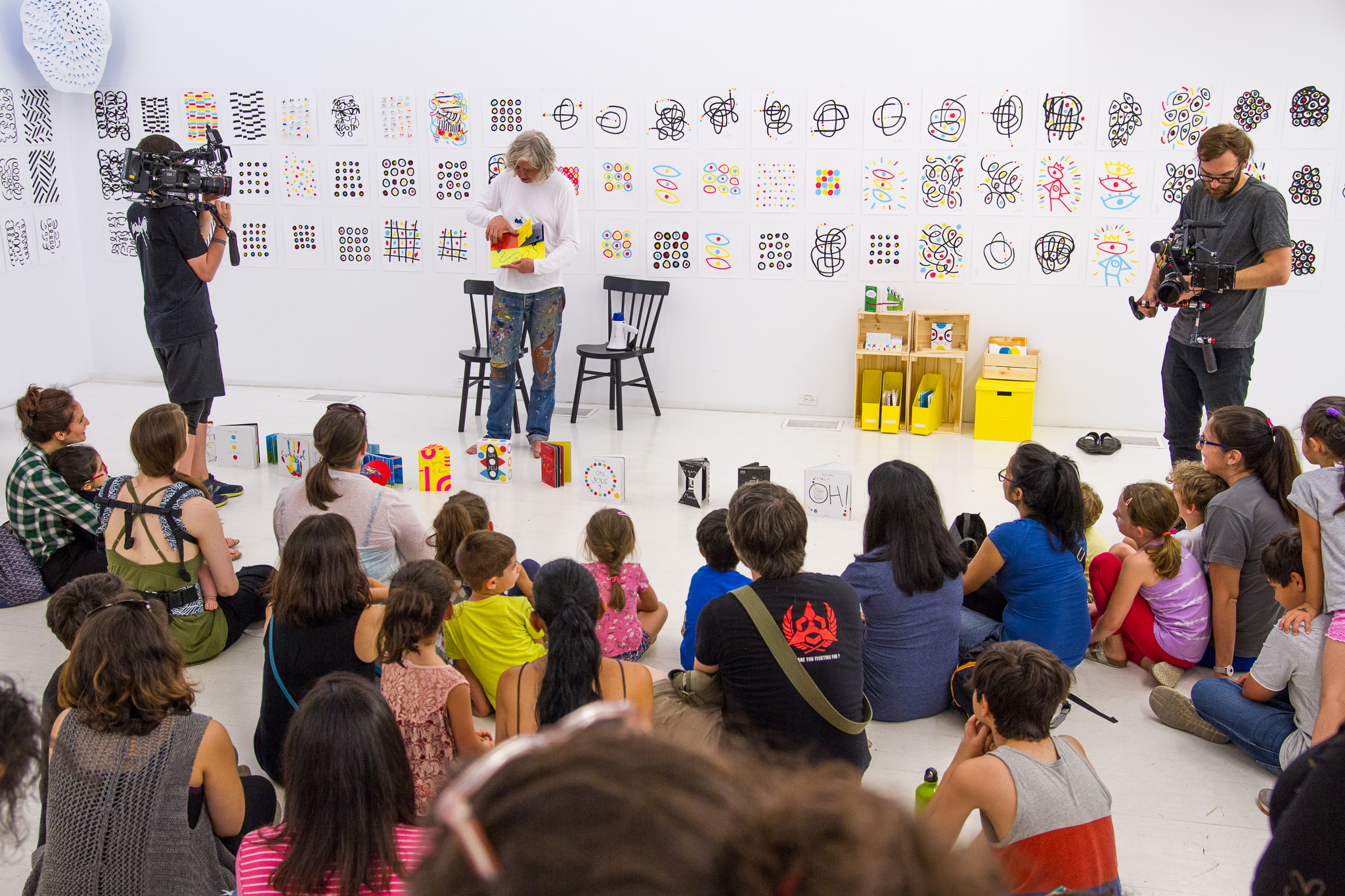 Atelier lecture au Livart